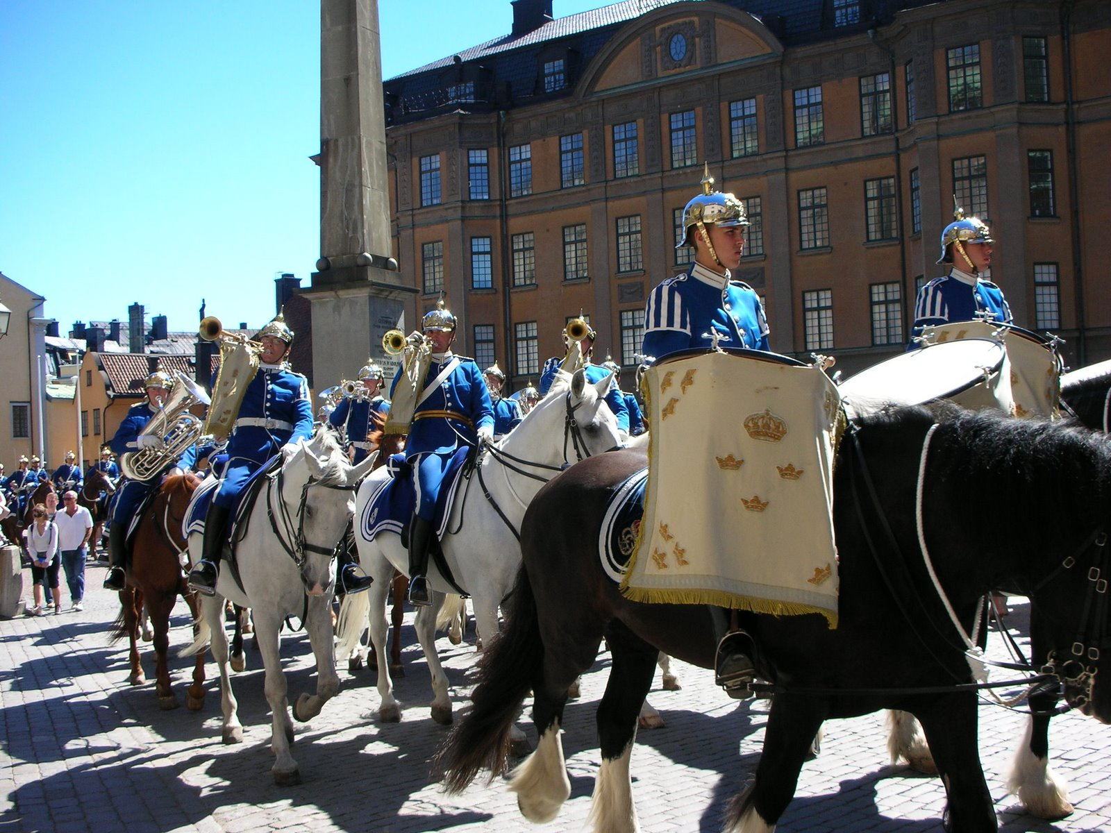 Högvakten i Stockholm.